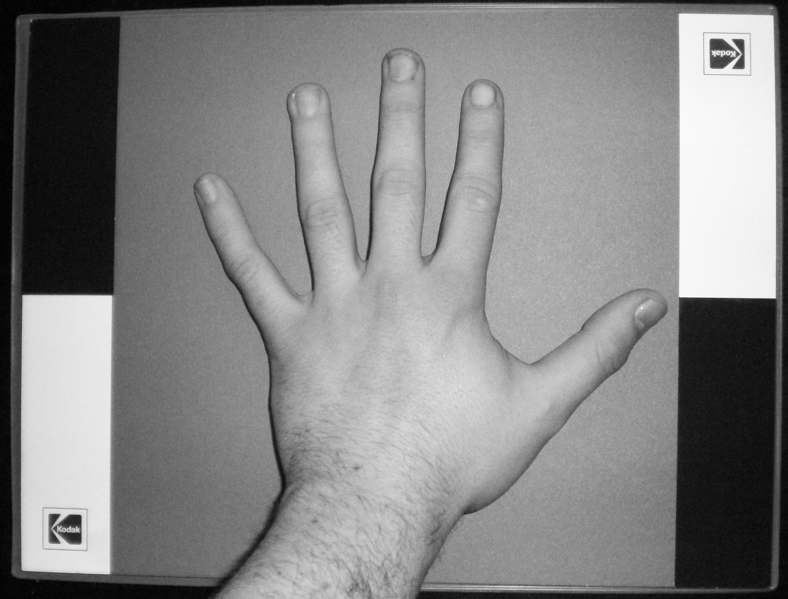 Main d'homme blanc sur gris à 18%